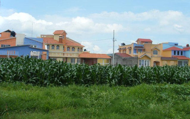 Uriangato